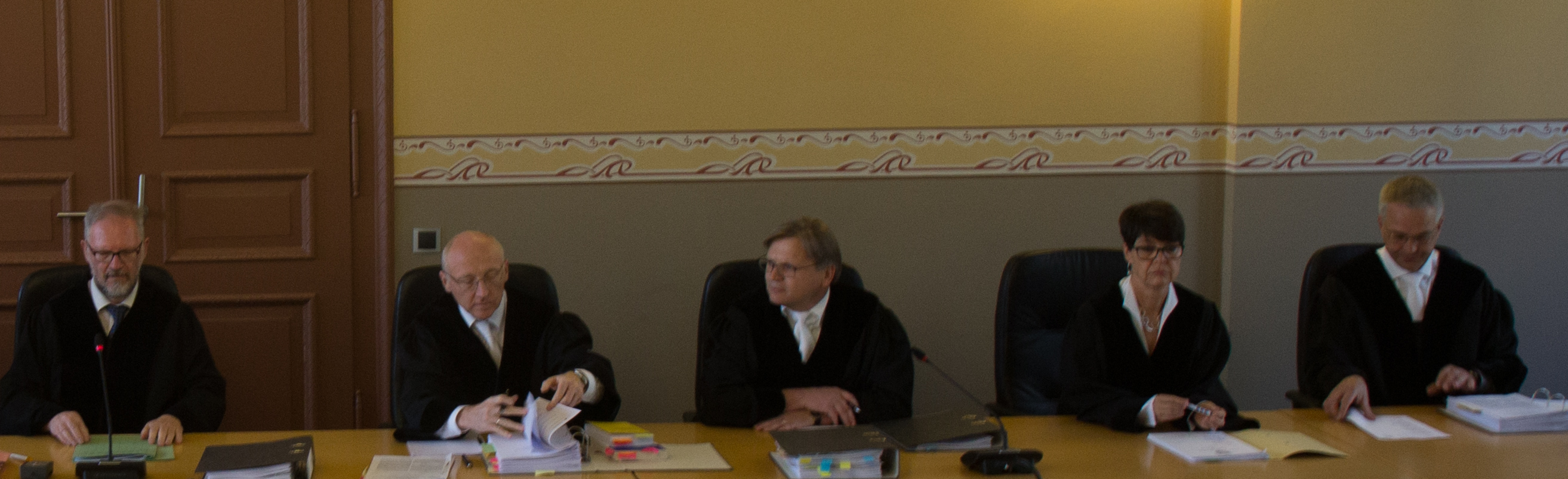 Thüringer Verfassungsgerichtshof. Öffentliche Sitzung am 14. Juni 2017 in Weimar